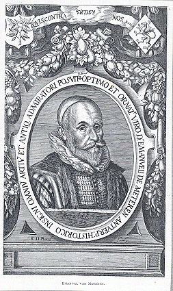 Portret van Emanuel van Meteren op 73-jarige leeftijd, door R.D. Boud (1607).